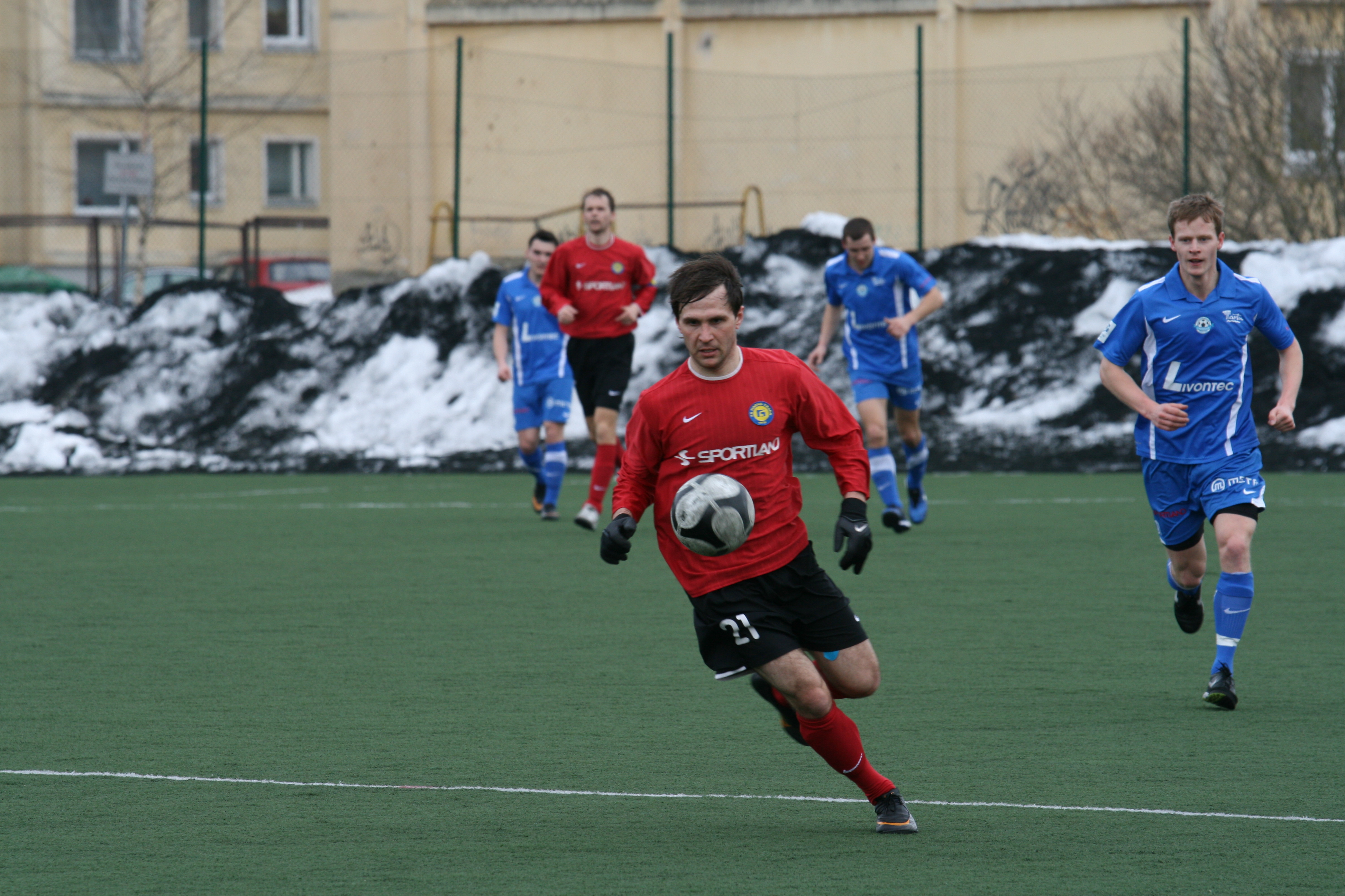 Narva Trans (punases)